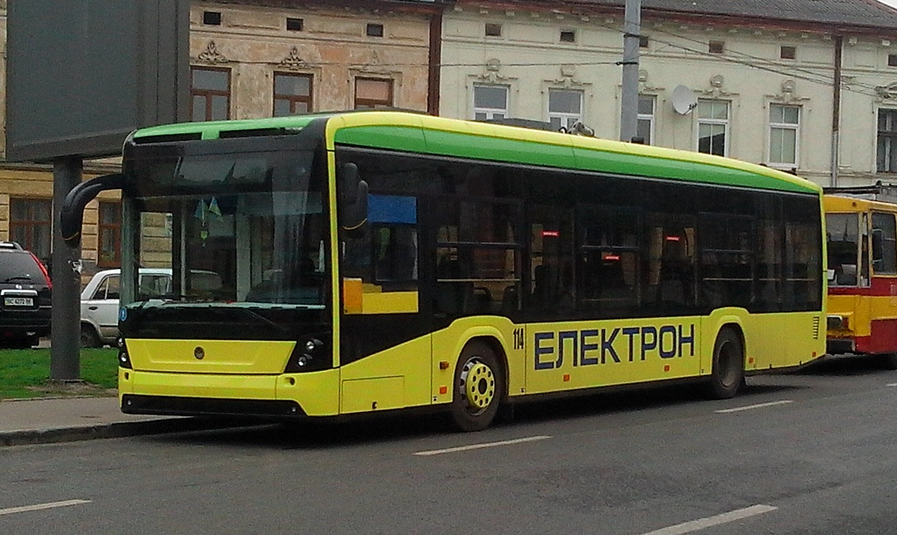 Тролейбус Електрон у Львові на вул. Митрополита Андрея